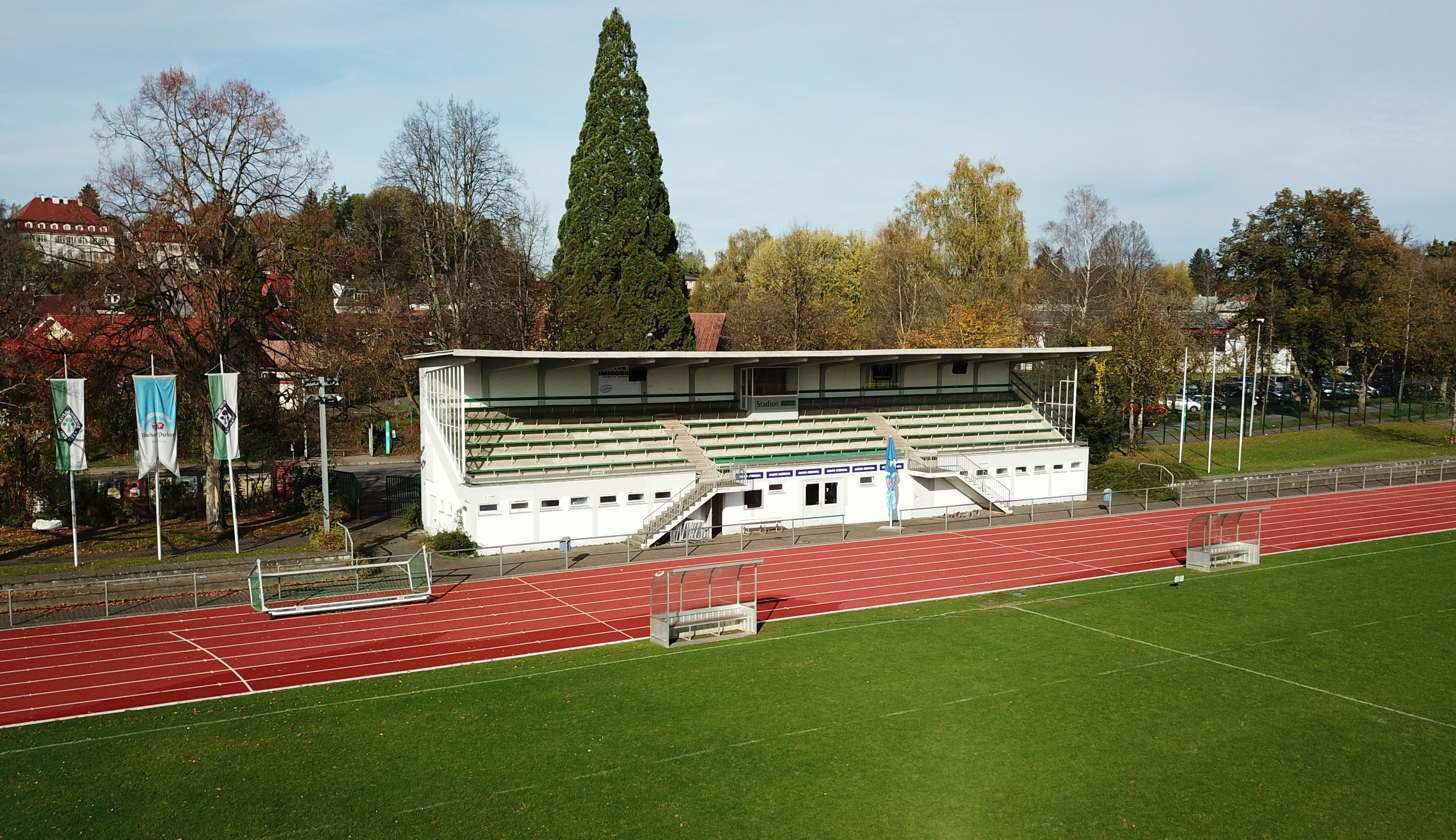 Städt. Stadion Lindau